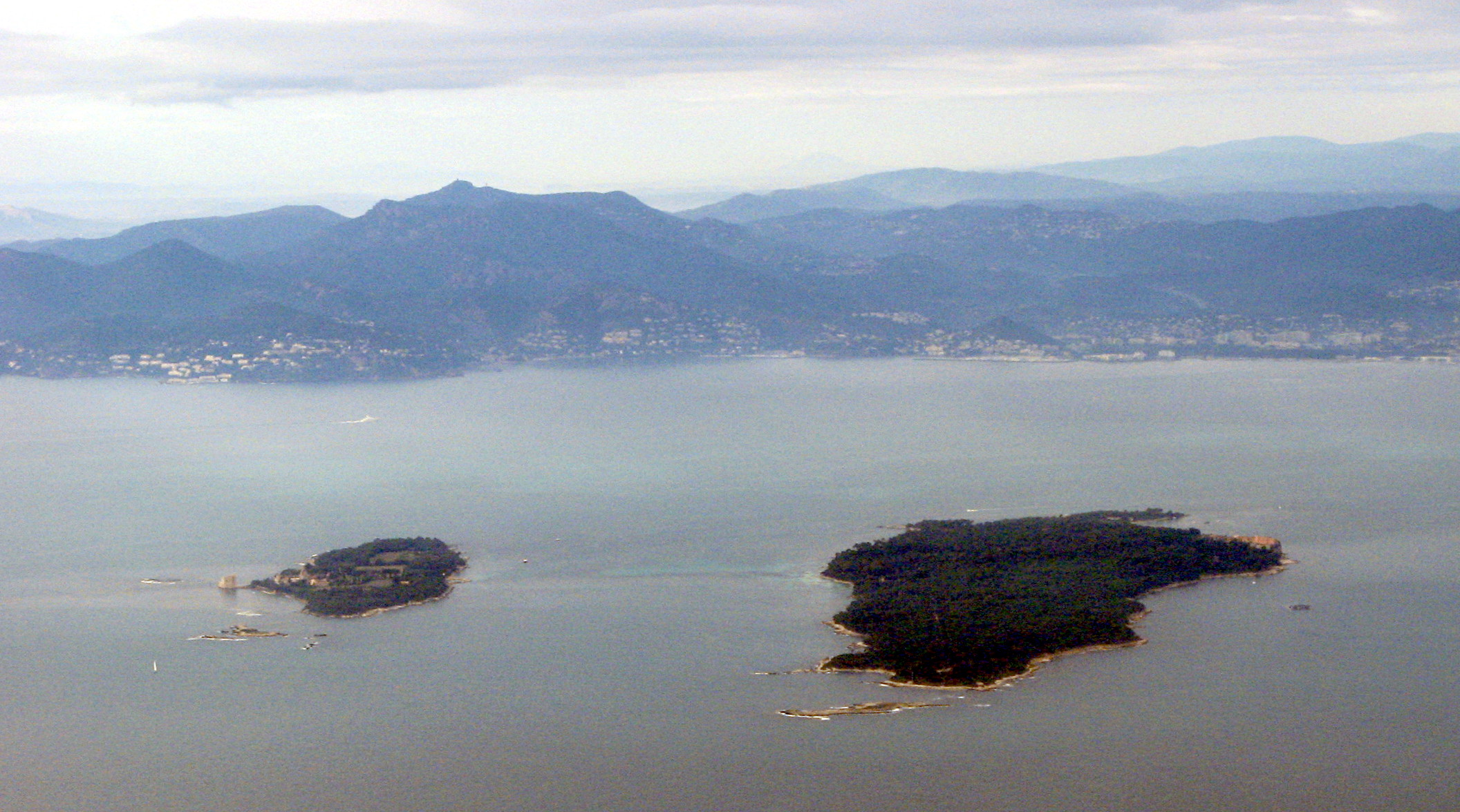 Леринские острова и массив Эстерель